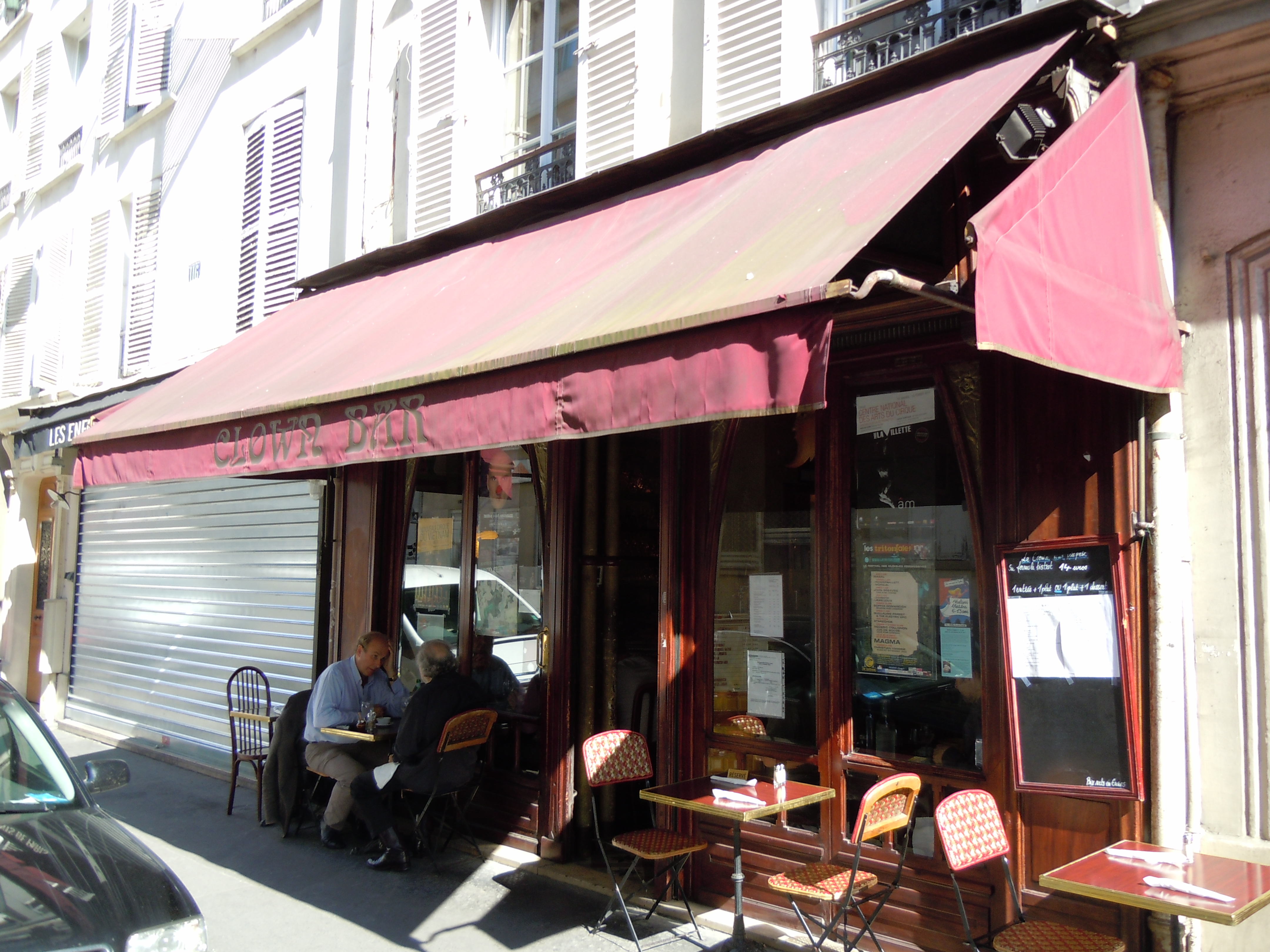 La facade du Clown-Bar 114 rue Amelot 75011 Paris